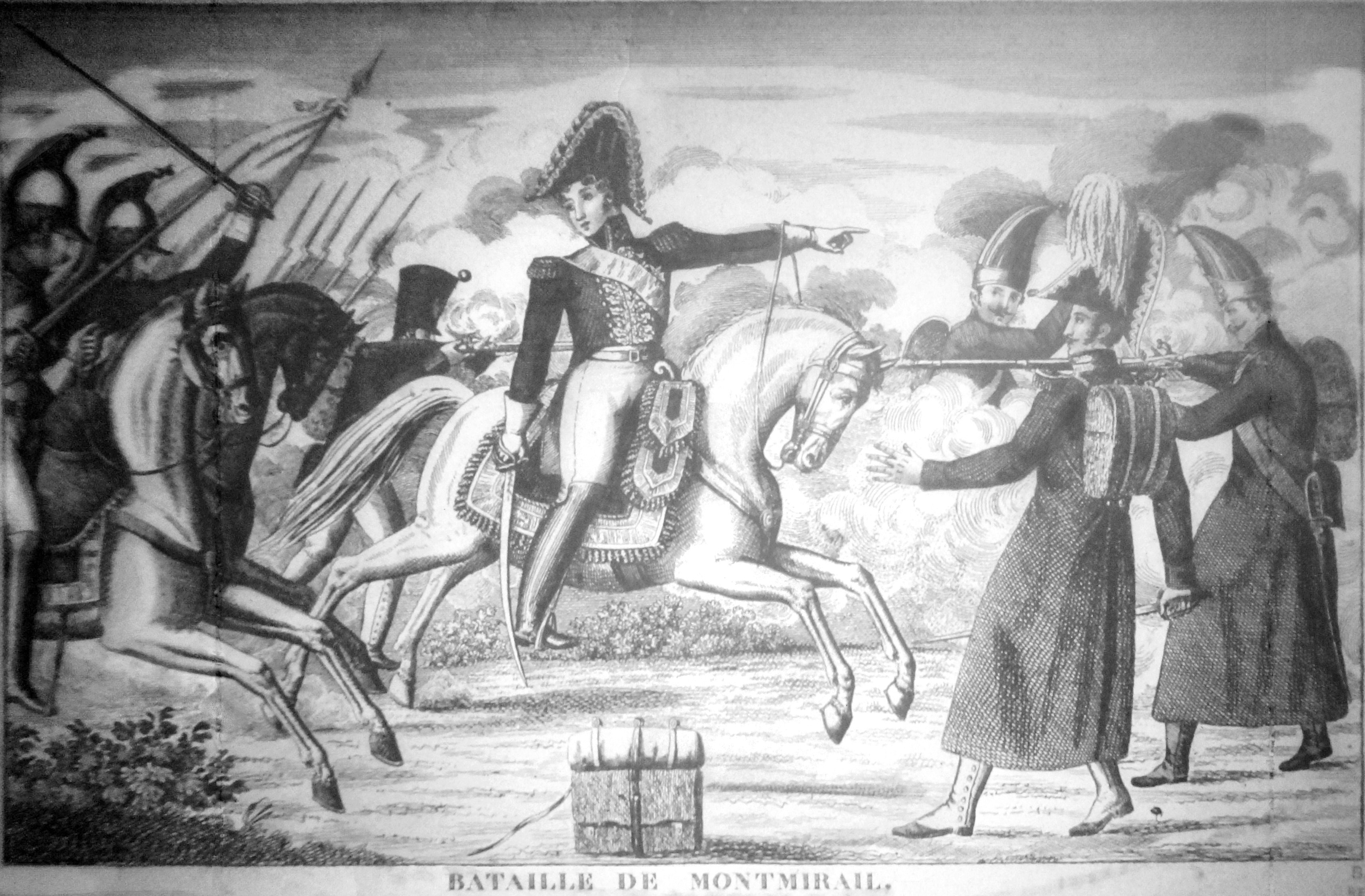 cf titre.